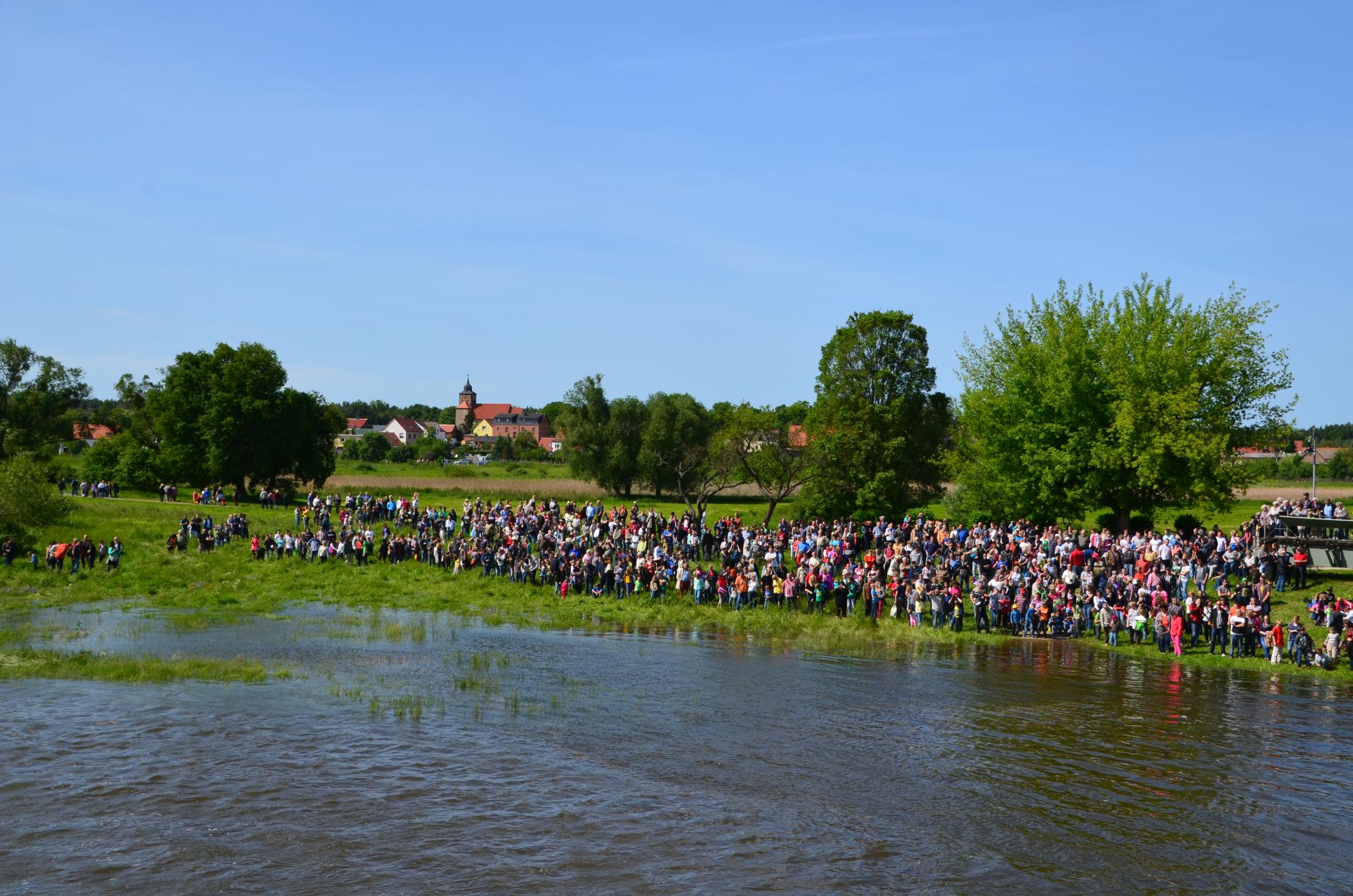 Pretziener Wehr